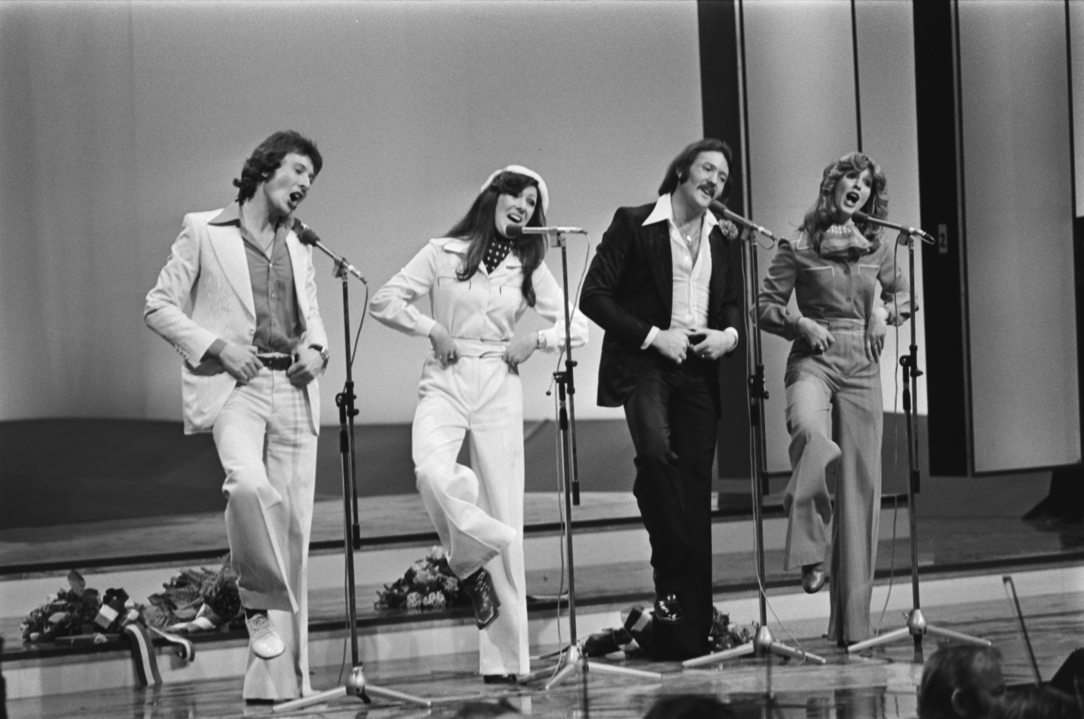 Collectie / Archief : Fotocollectie Anefo Reportage / Serie : [ onbekend ] Beschrijving : Eurovisie Songfestival 76 Den Haag ; Brotherhood of Man (Engeland) tijdens optreden Datum : 3 april 1976 Locatie : Den Haag, Groot-Brittannië Trefwoorden : songfestivals Persoonsnaam : Brotherhood of Man, Eurovisie Songfestival Fotograaf : Mieremet, Rob / Anefo Auteursrechthebbende : Nationaal Archief Materiaalsoort : Negatief (zwart/wit) Nummer archiefinventaris : bekijk toegang 2.24.01.05 Bestanddeelnummer : 928-5012